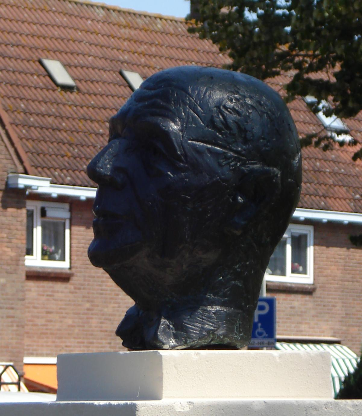 Den Haag, Alberdingk Thymplein. Monument J.W. Albarda van Titus Leeser. The Hague/The Netherlands.